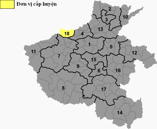 Hành chính tỉnh Hà Nam, Trung Quốc